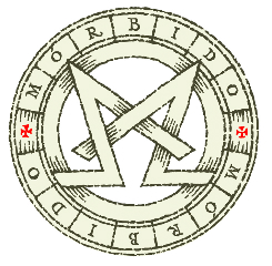 Logo Morbido Film Fest